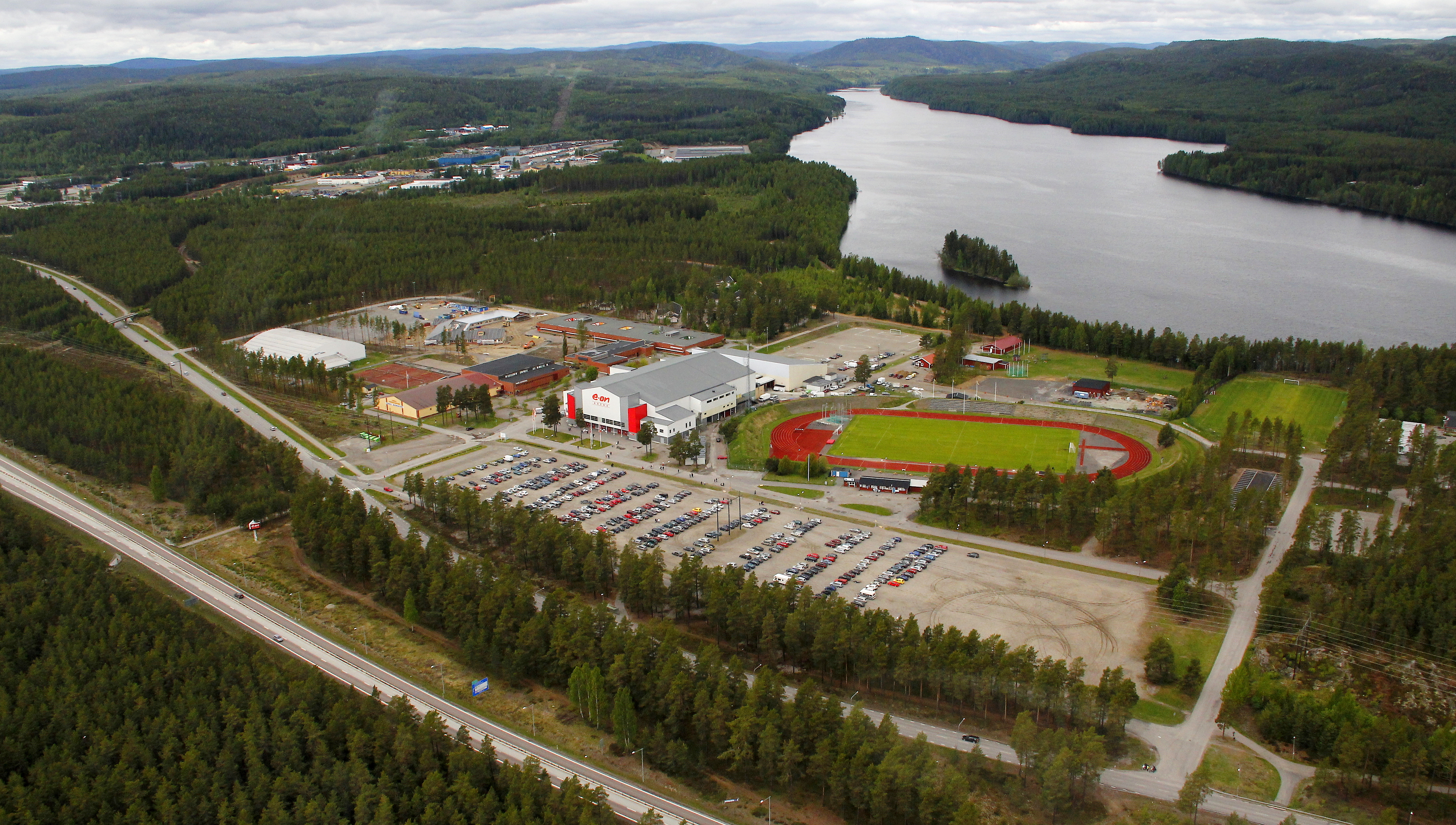 Timrå IK:s hemmaarena i Sörberge, Timrå